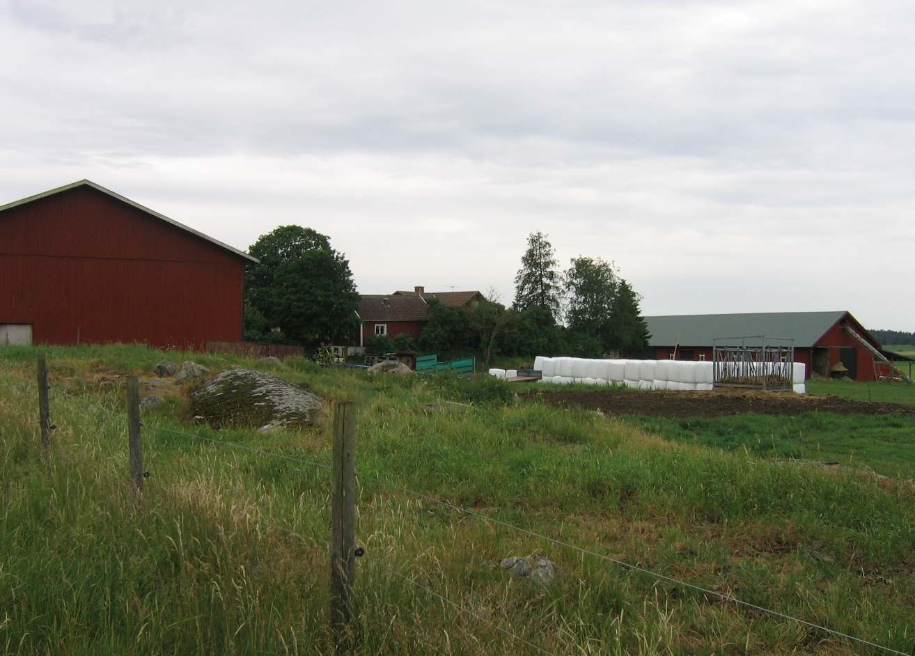 farm